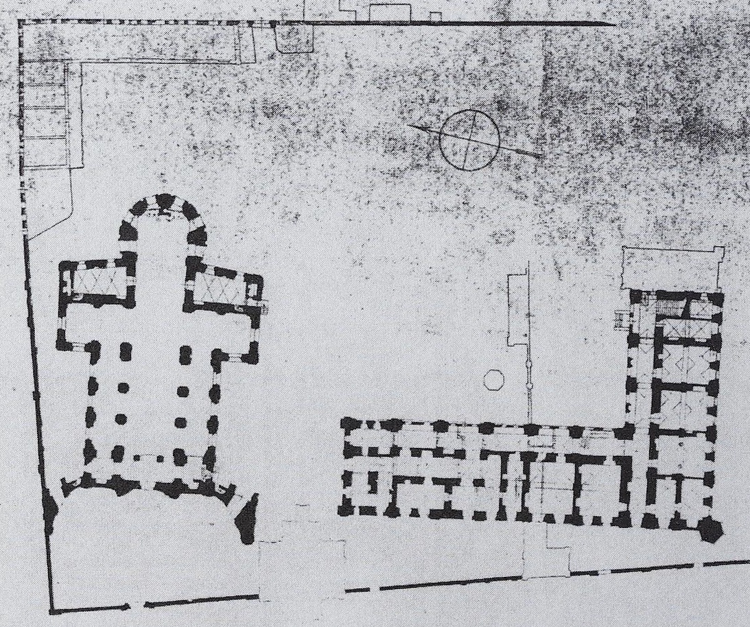 Беларуская (тарашкевіца): Пінск (Pinsk), пляц Рынак (plac Rynak). Сьвятога Станіслава і калегіюм езуітаў, абмеры